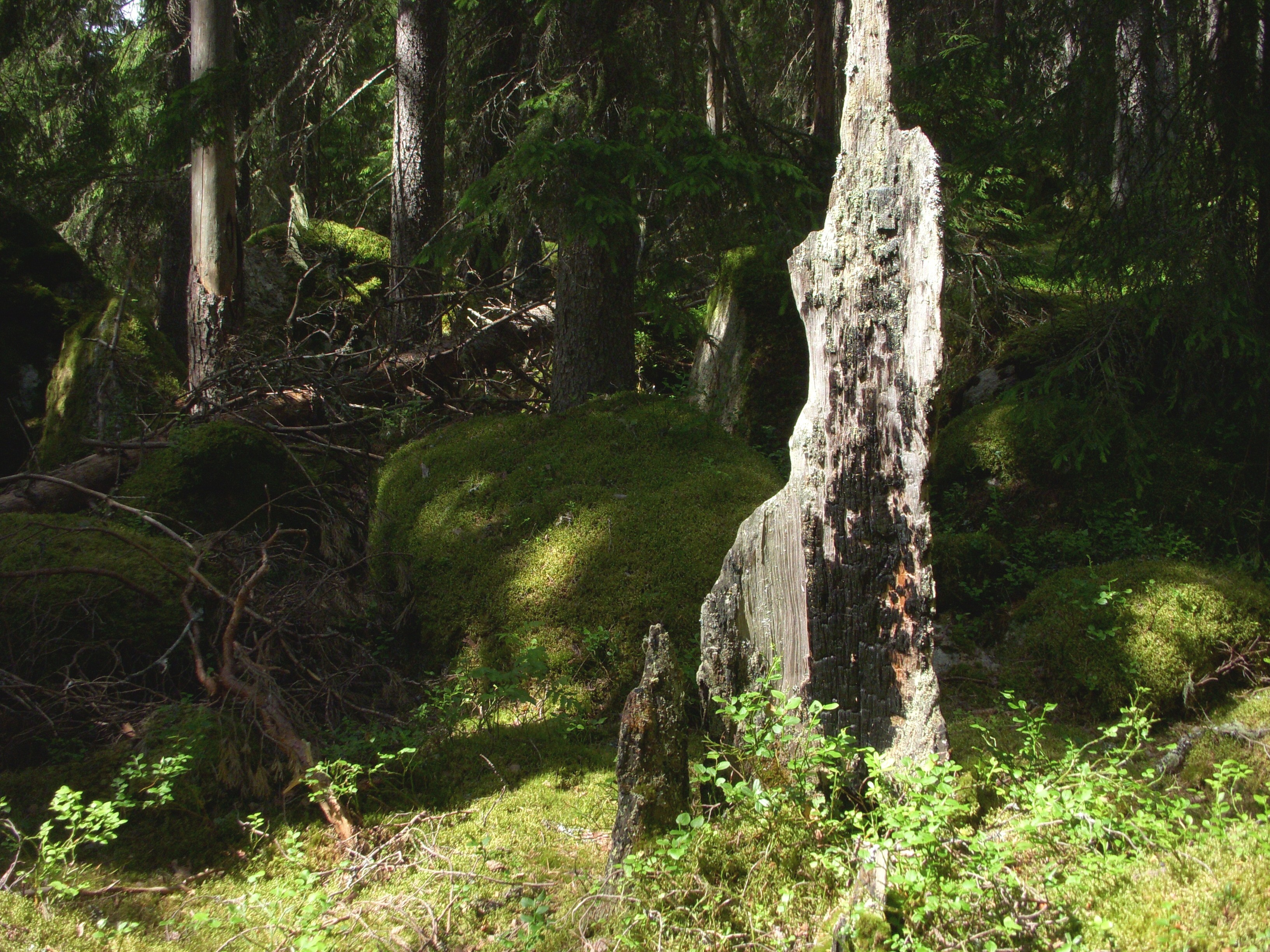 Nybrännberget naturreservat i Ludvika kommun